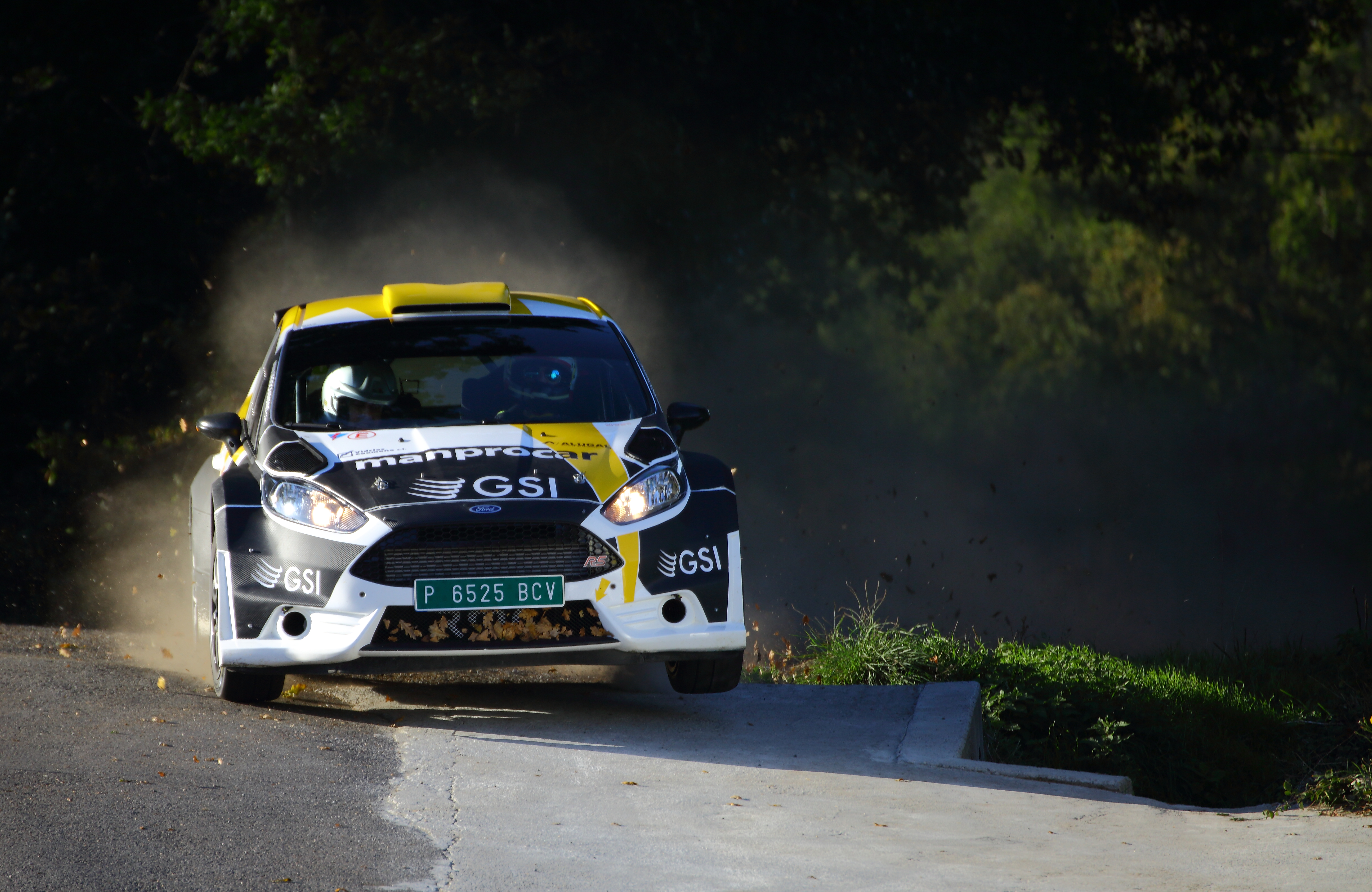 Adrián Díaz gana el Rally San Froilán.